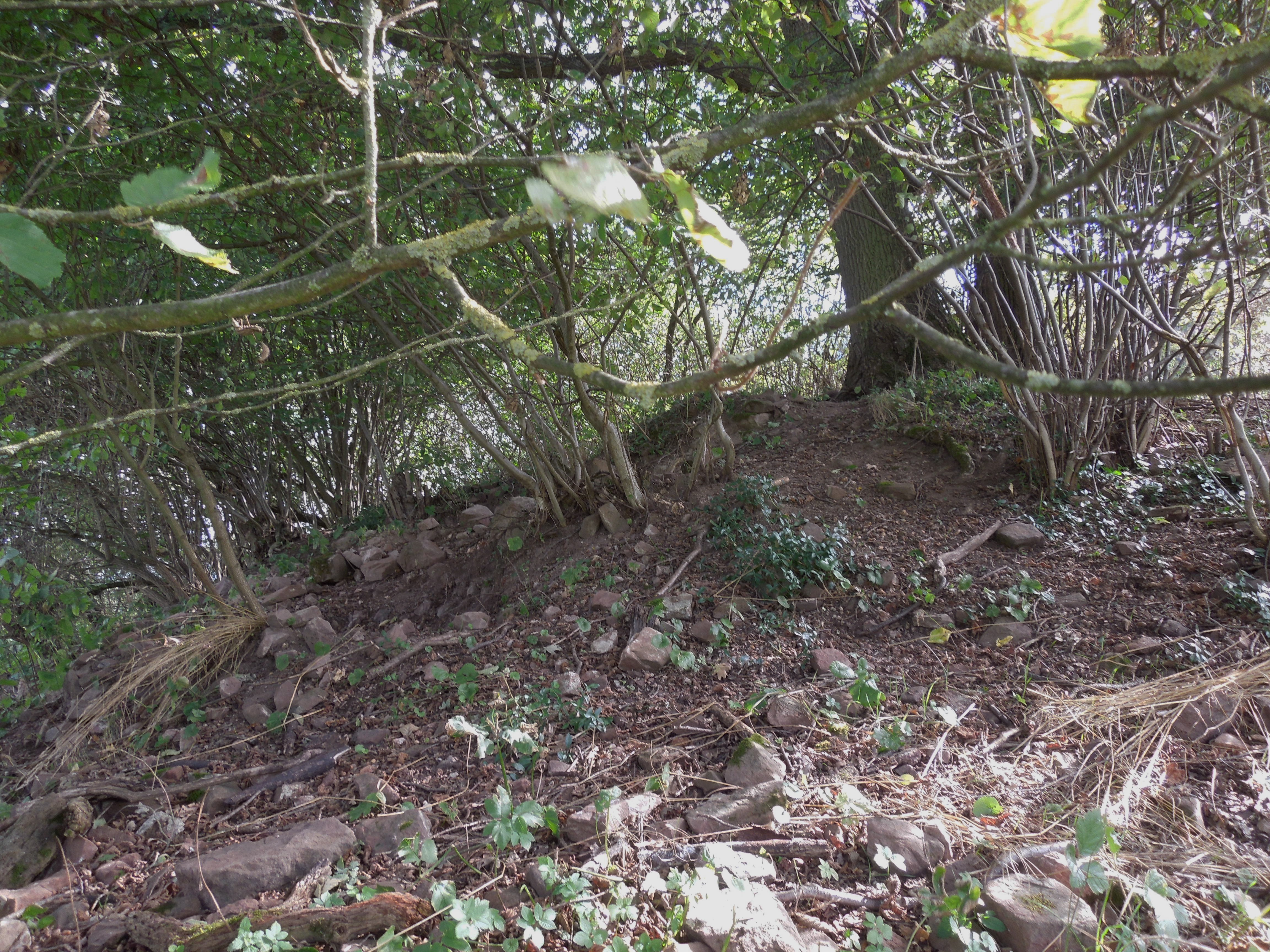 Steinreste der Margarethenkirche bei Kerstenhausen